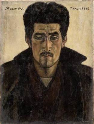 Fujimori Selbstportrait